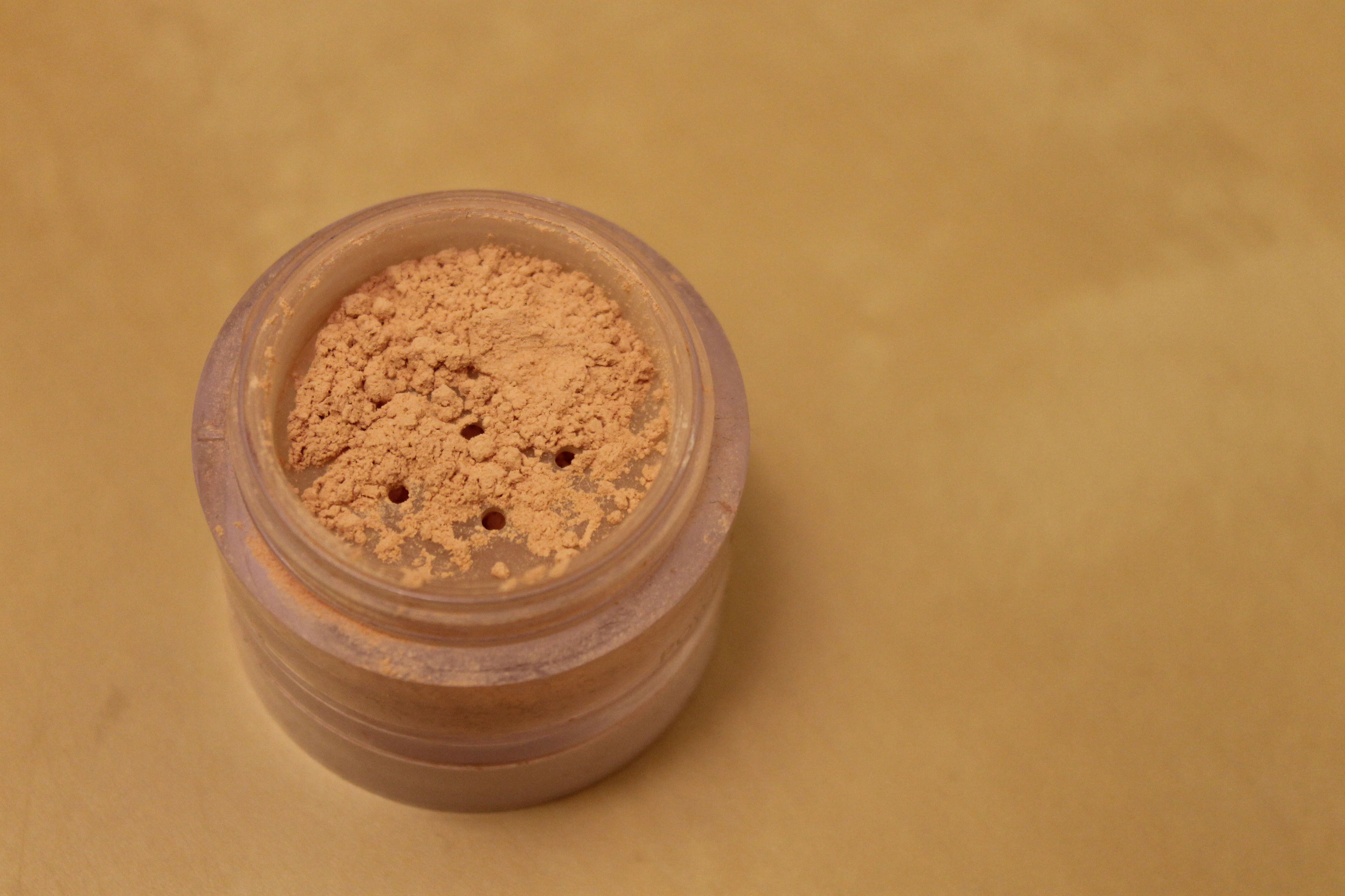 Loose mineral powder